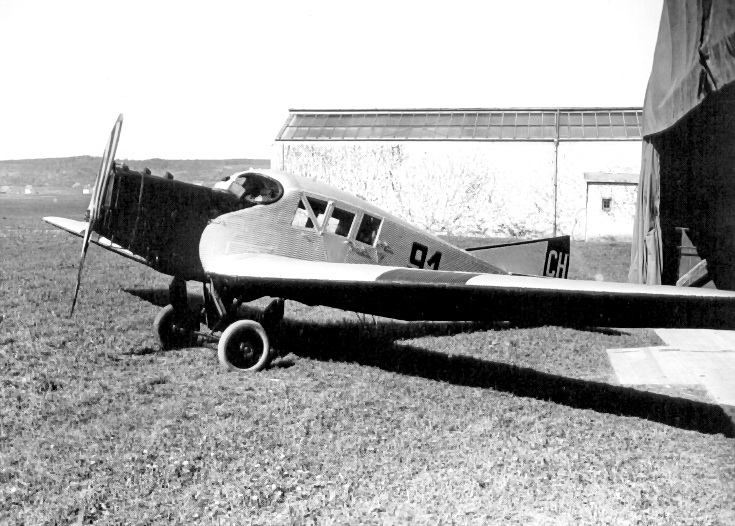 Ad Astra Aero S.A. Junker F13 (CH91)